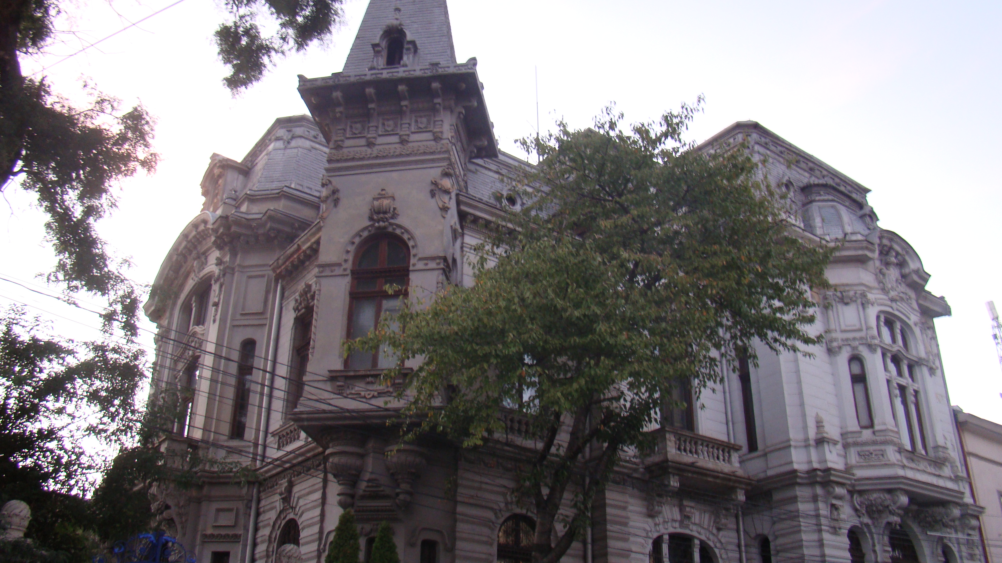 Ansamblul Arhiepiscopiei Craiovei și Mitropoliei Olteniei